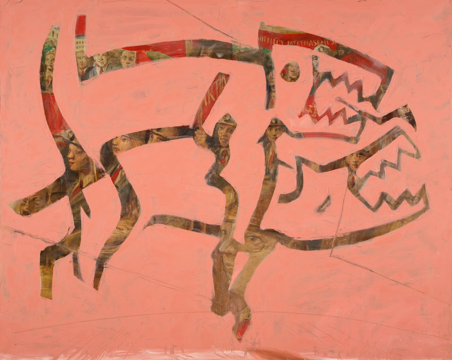 Peinture de Piotr Szmitke